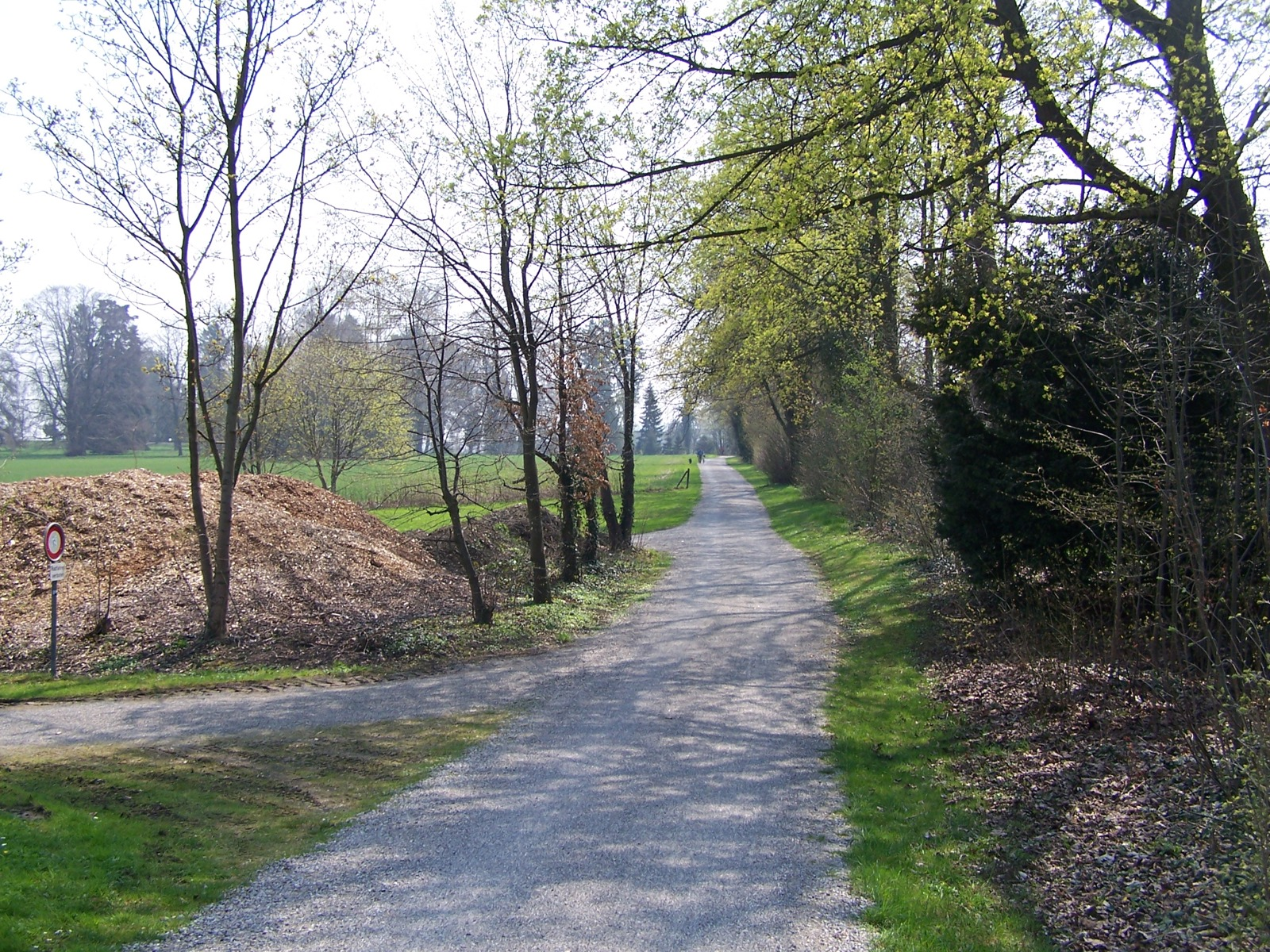 Teilstück Bodenseeradweg